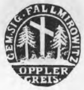 Altes Siegel des Ortes Fallmirowitz im Kreis Oppeln, Schlesien.